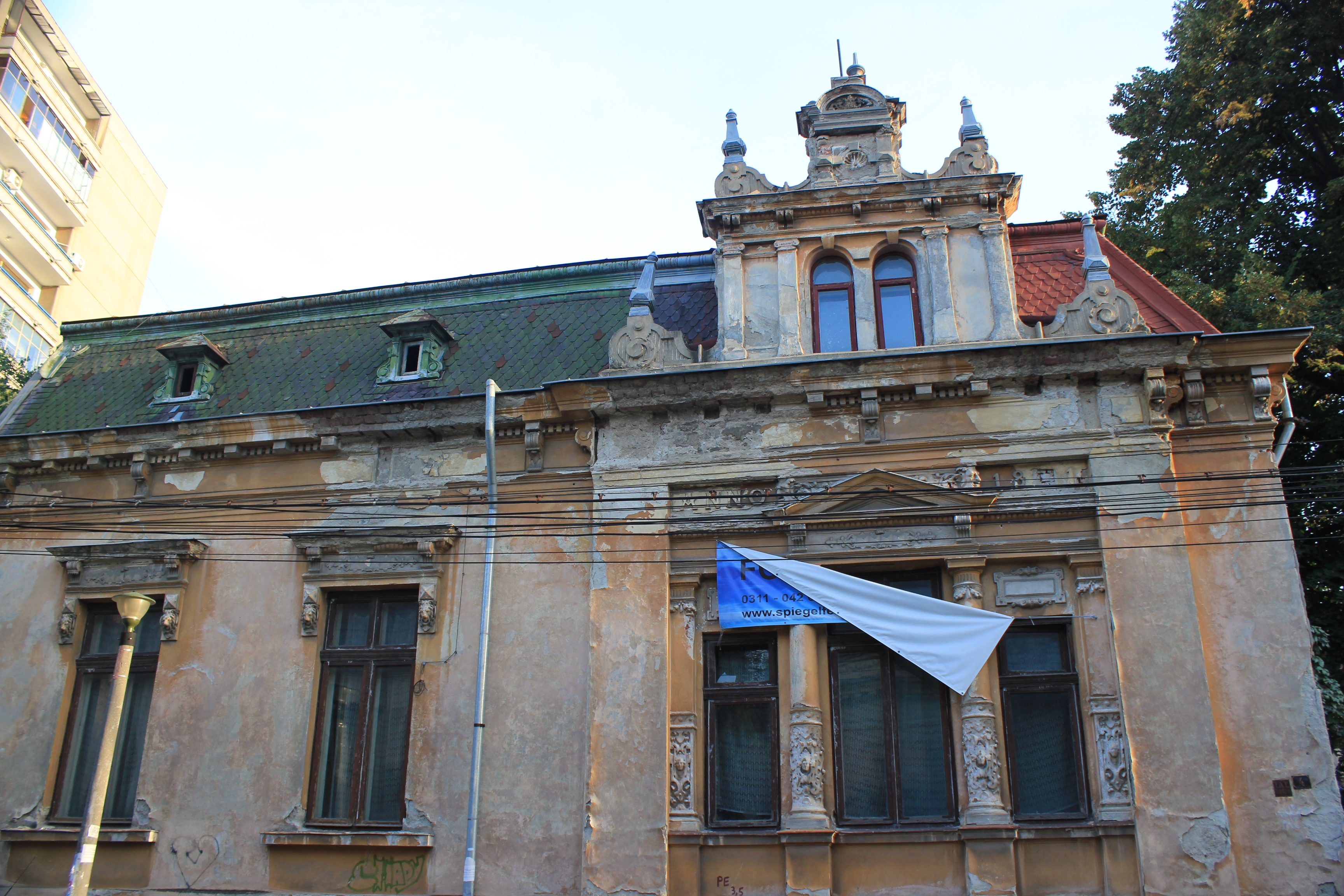 Casă Plantelor 4